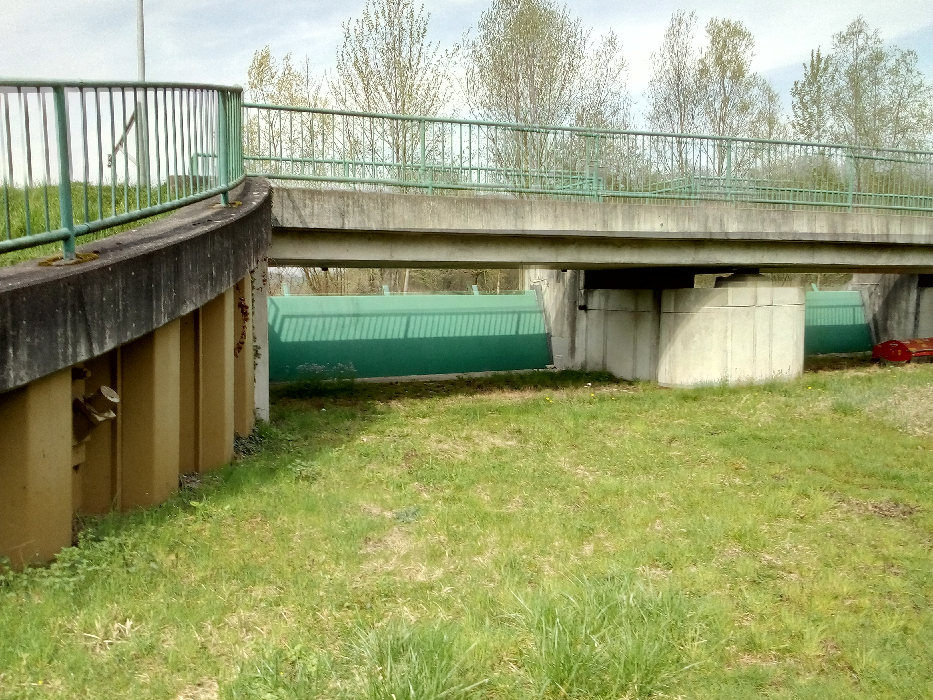 Hochwasserentlastungsanlage des Hochwasserrückhaltebeckens Abtsmoor